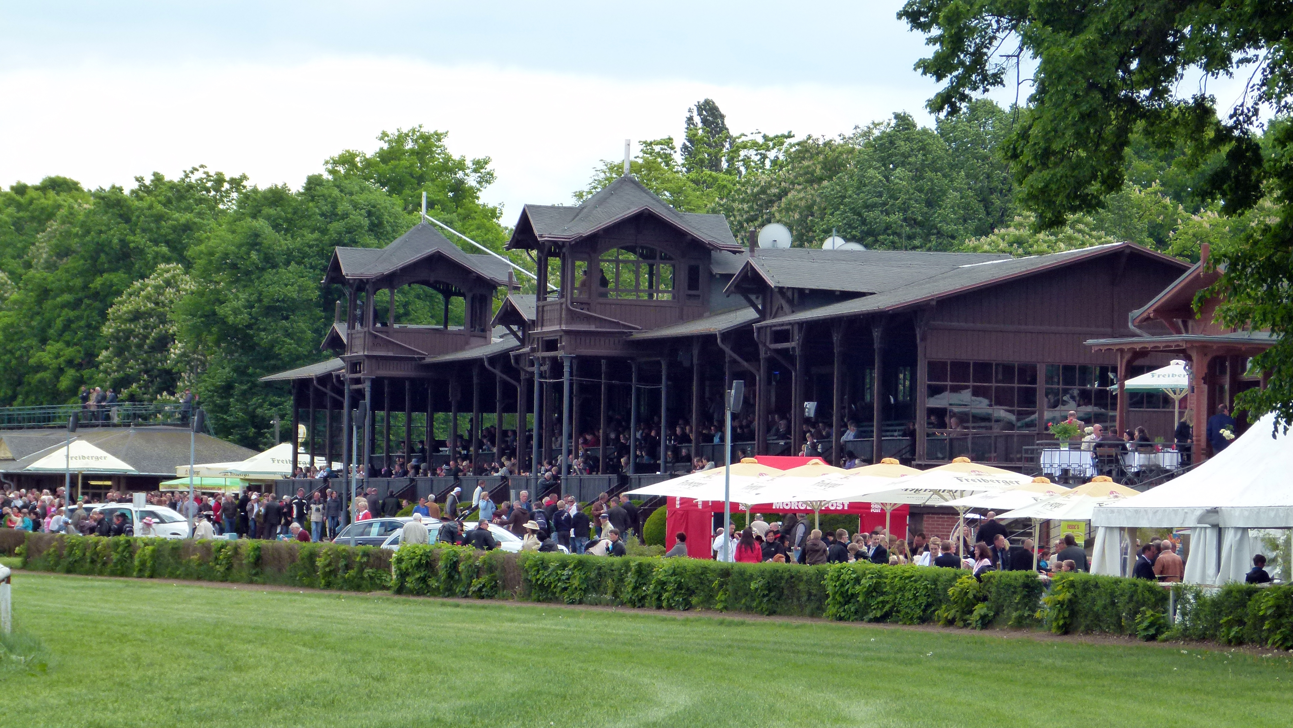 Seidnitzer Pferderennbahn, Seidnitz, Dresden